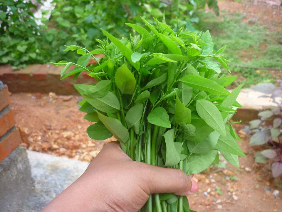 മൈസൂർ ചീരയുടെ തോരനായി ഉപയോഗിക്കുന്ന കിളുന്നു ഭാഗം